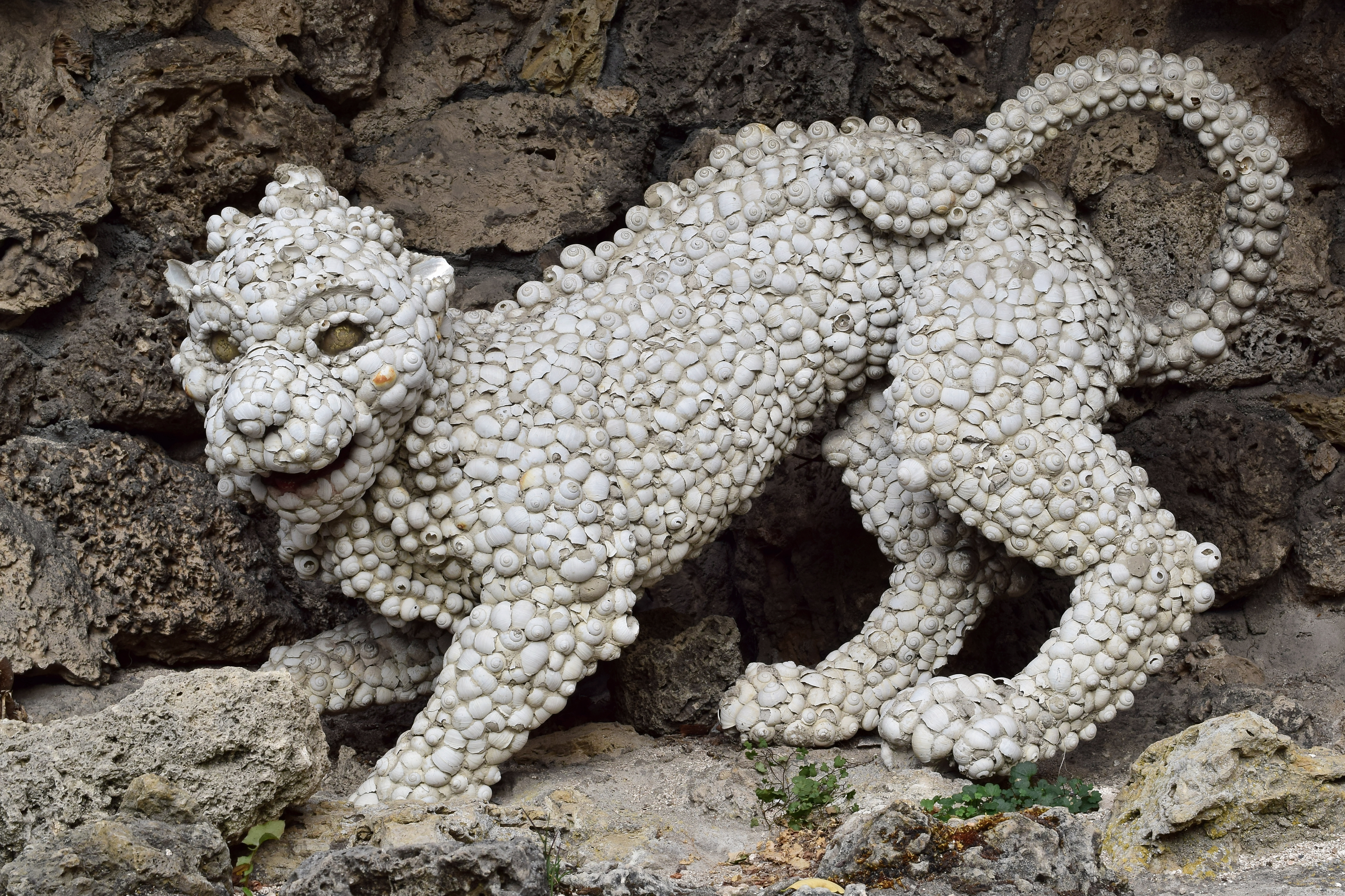 Das Grottenhaus mit Belvedere ist ein zweigeschoßiger, achteckiger Tempel mit Tuffsteinsockel, der 1772/73 geschaffen wurde. In Höhlen, die in den Sockel eingearbeitet sind, befinden sich von Materno Bossi gestaltete Tiergestalten.This is a photograph of an architectural monument.